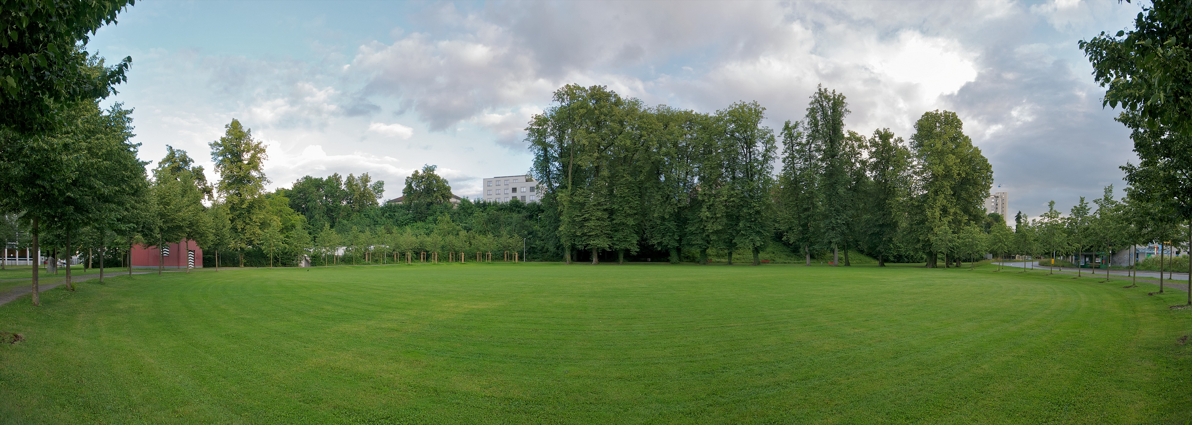 Platz/Wiese in Aarau, Schweiz